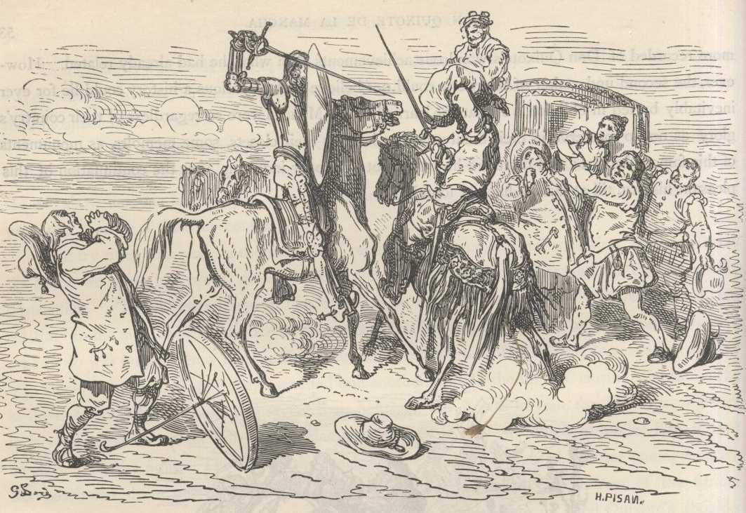 "Dom Quixote em luta com o escudeiro Biscainho" (1863), iIustração por Gustave Doré para “Don Quixote“ de Miguel de Cervantes.